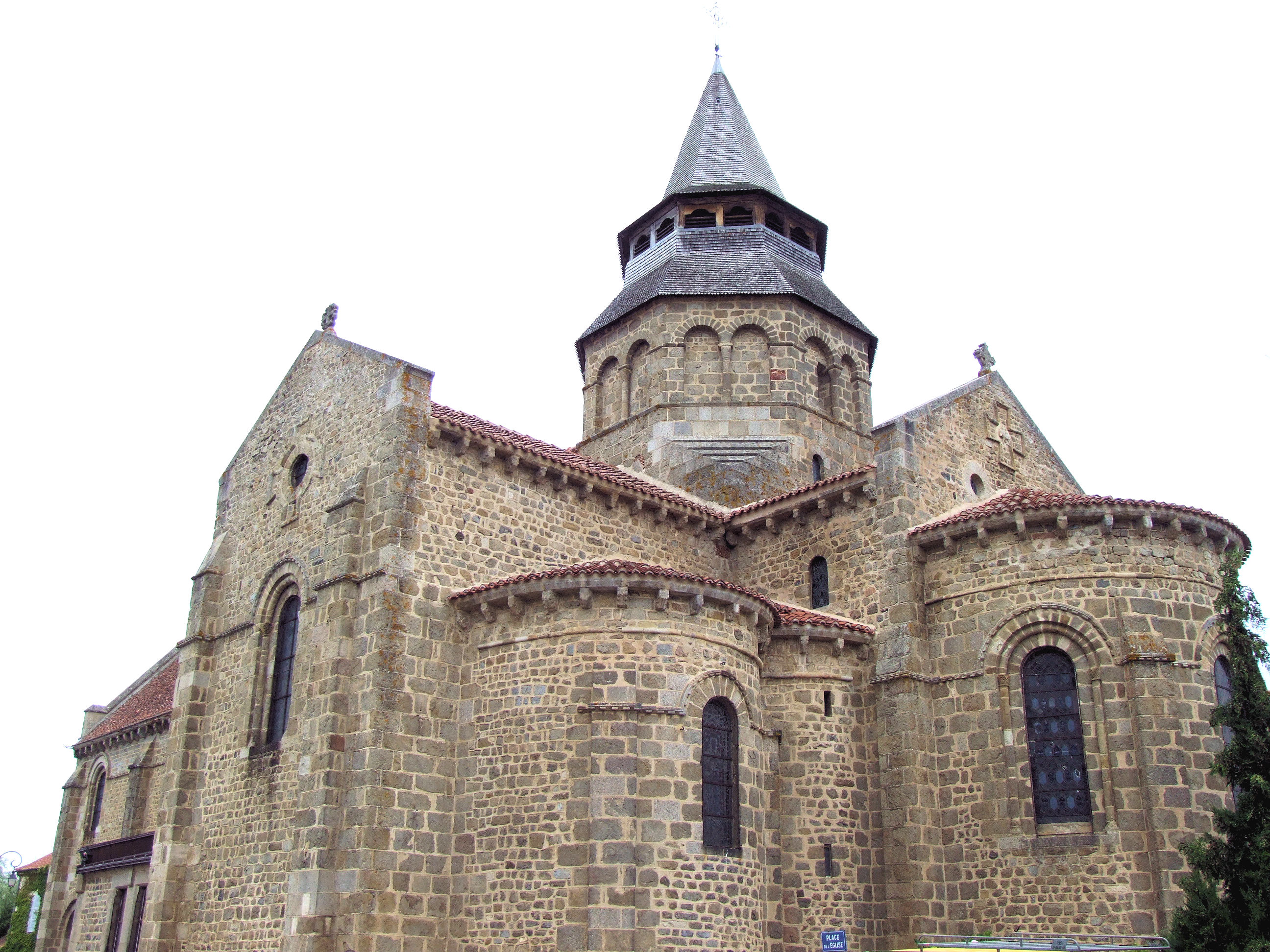 Huriel - Église Notre-Dame - Chevet